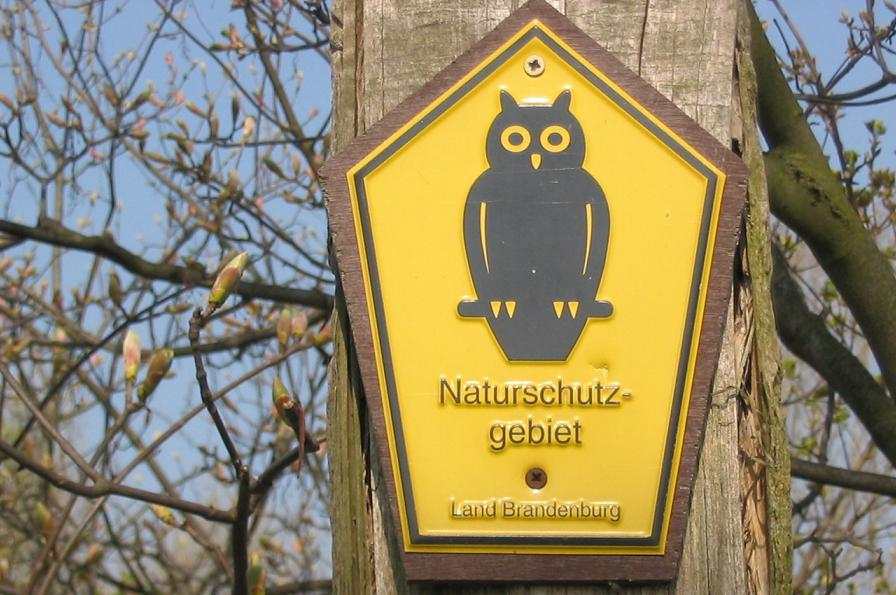 Schild Naturschutzgebiet * Ursprünglich von Benutzer:Lienhard_Schulz als 1,5 MB BMP Bild:Schild_Naturschutzgebiet.bmp hochgeladen mit Kommentar ( Schild Naturschutzgebiet; Selbst fotografiert, April 2004; GNU FDL ), von LosHawlos verkleinert.